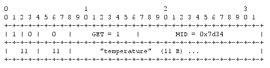 CoAP - Get - Request